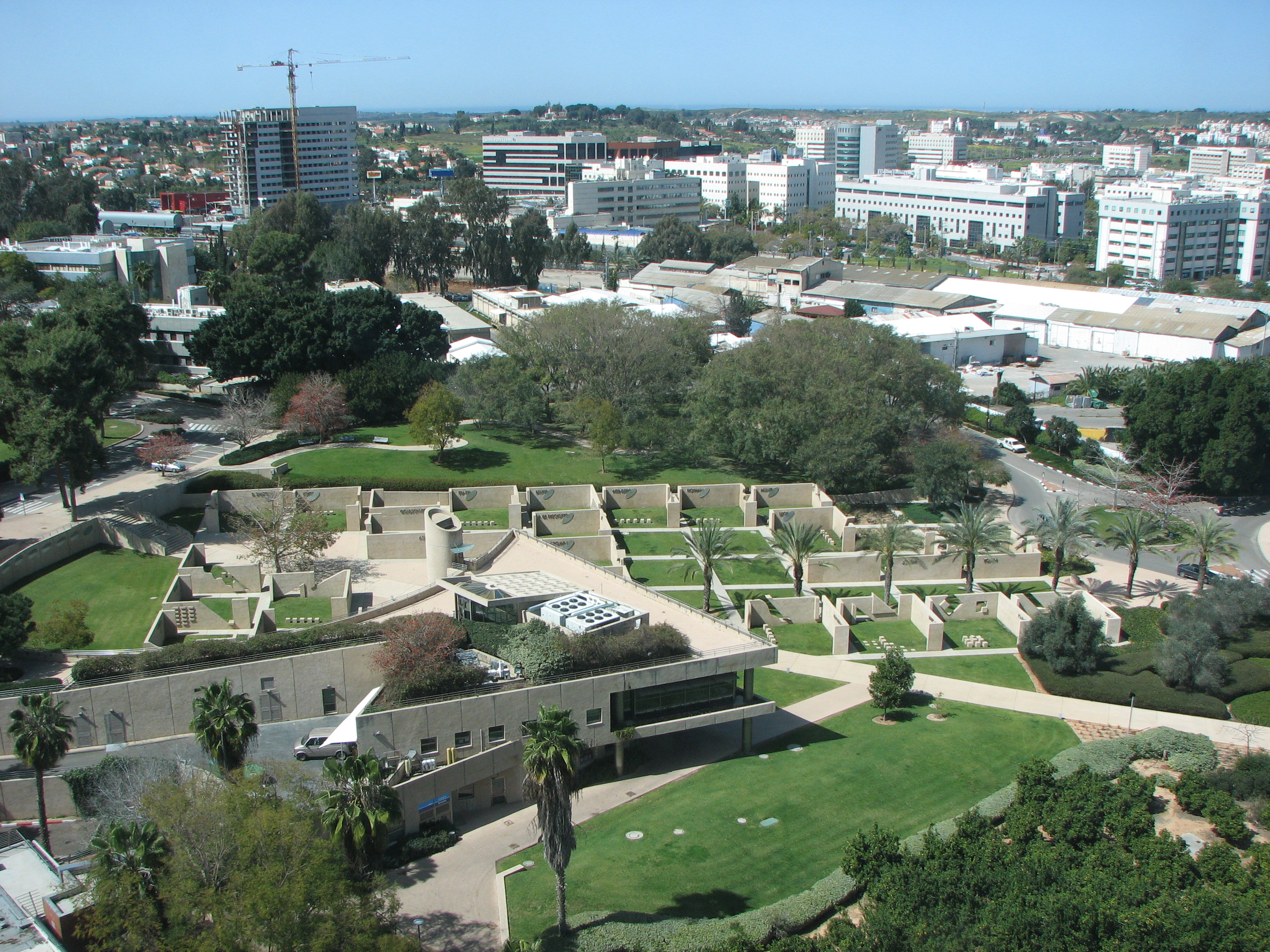 he:מכון ויצמן למדע - מראה כללי ממרומי מגדל המאיץ